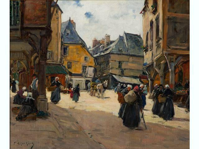 Fernand Legout-Gérard (1856-1924) : la place de l'Apport à Dinan (Côtes-du-Nord)